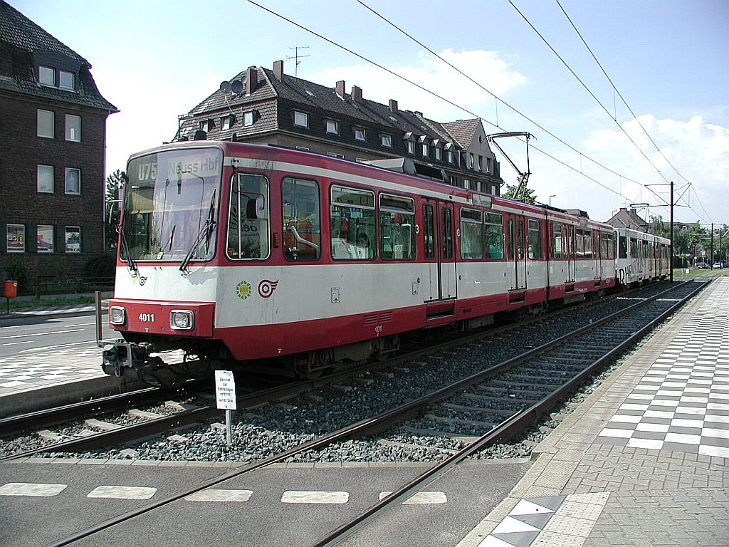 Rheinbahn Tw 4011 in der Haltestelle Vogesenstraße